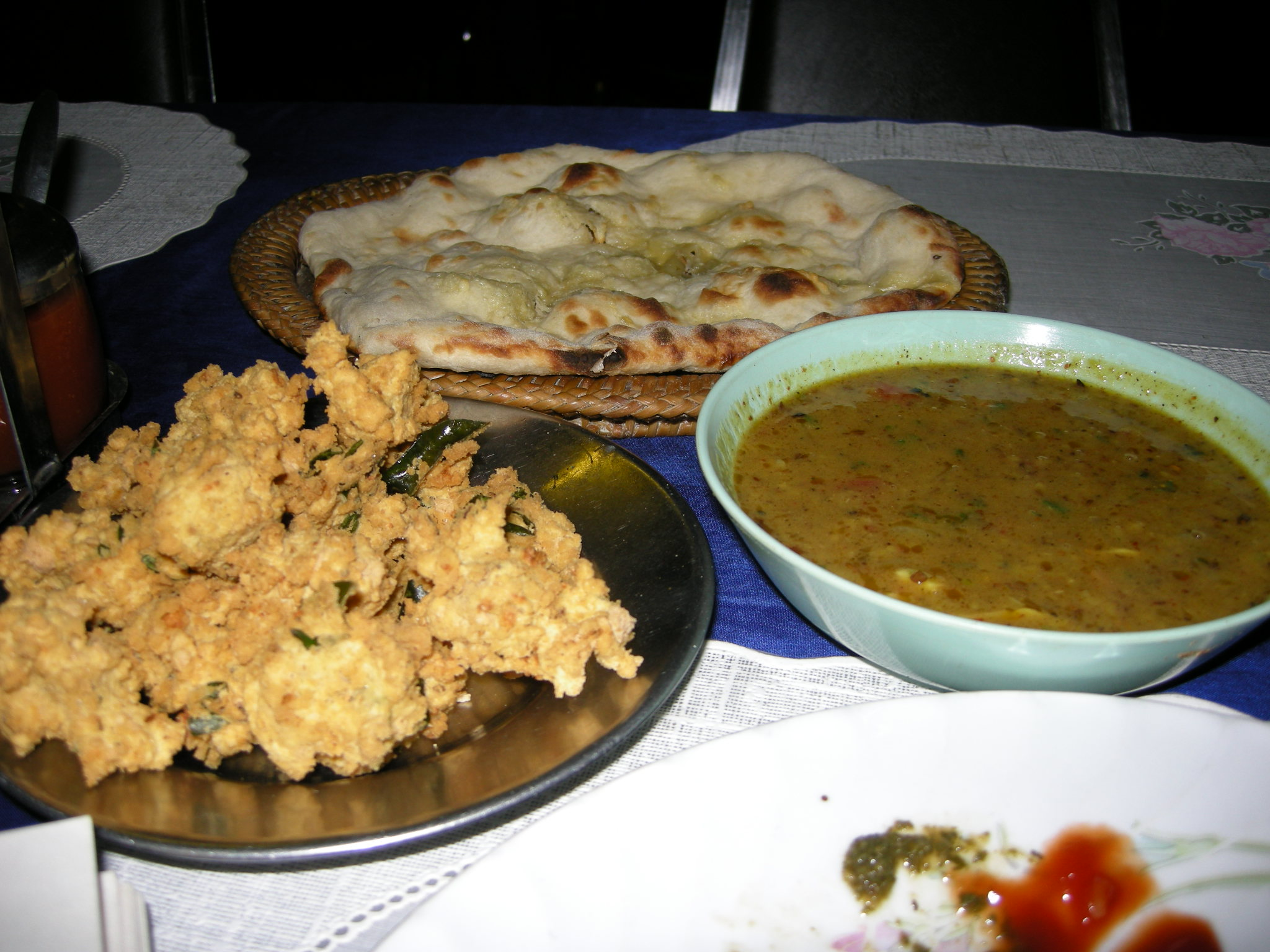 Dhal, pakora and naan in Luang Prabang, Laos.